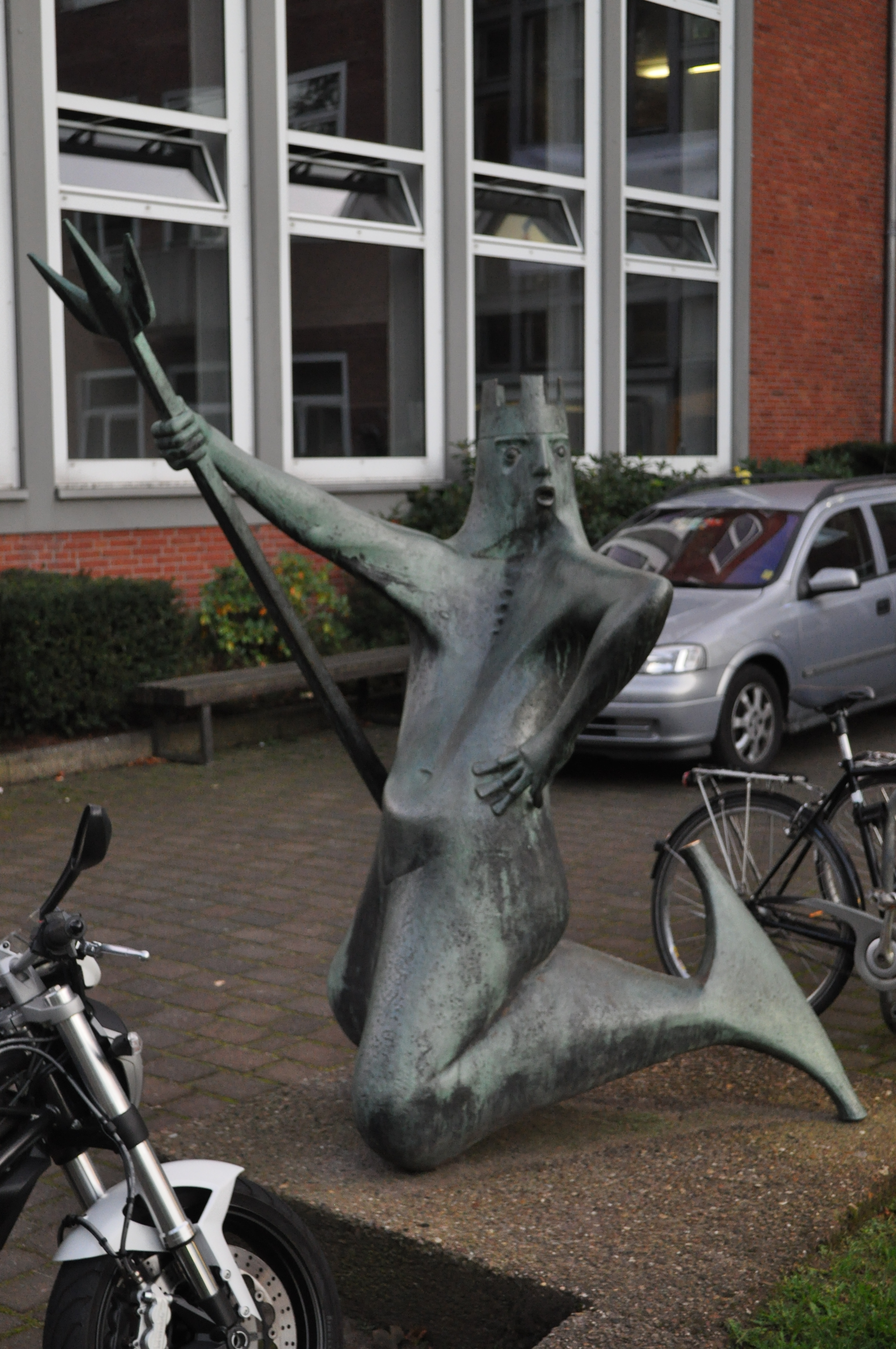 Neptun in Bremen.Das abgebildete Objekt ist ein geschütztes Kulturdenkmal in der Freien Hansestadt Bremen, mit der Nr. 1220,T001 beim Landesamt für Denkmalpflege registriert.